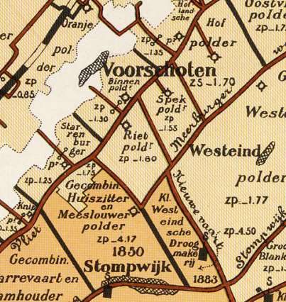 Rietpolder